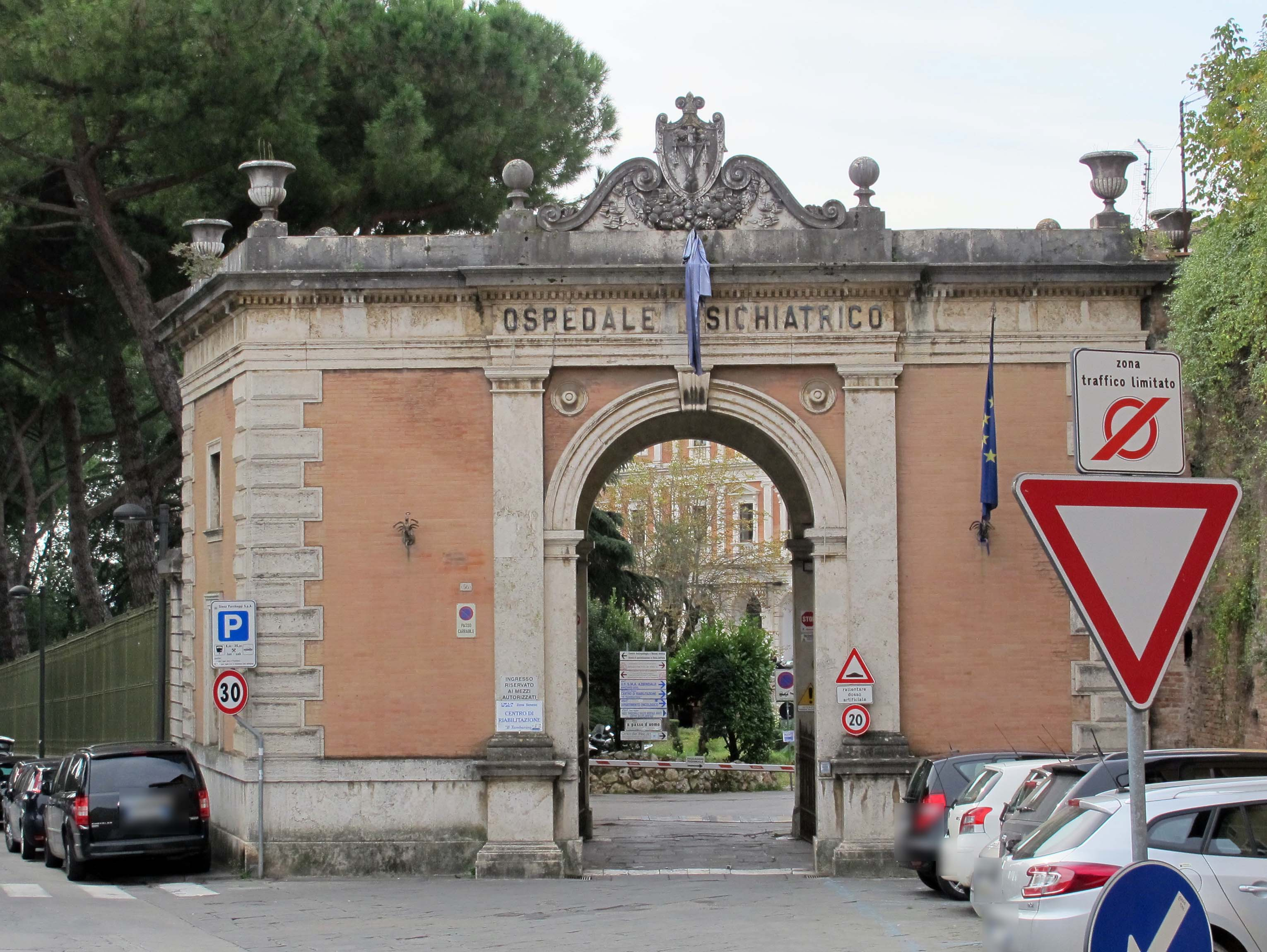 Siena